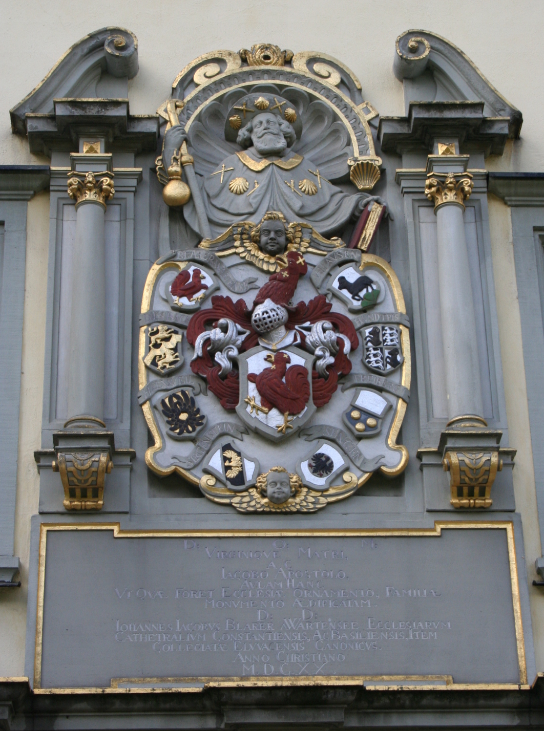 Portaldetail mit Darstellung des Hl. Jakobus am Gebäude des Landgerichts Konstanz in Konstanz